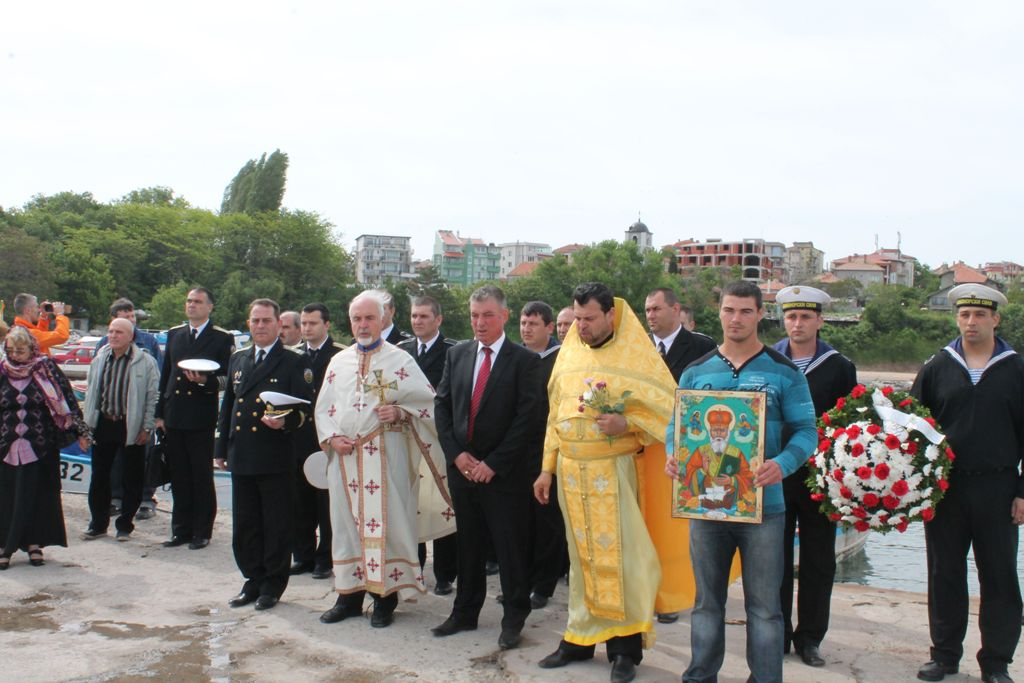 Честване на празника " Никулден " в гр.Черноморец